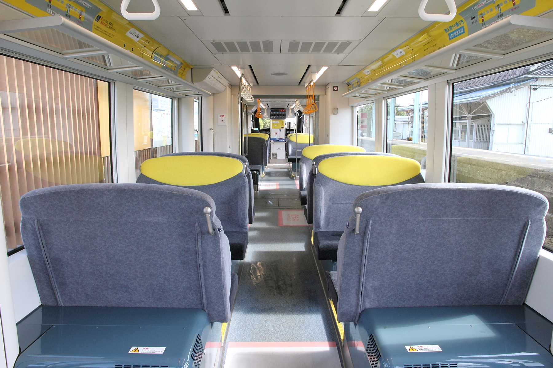 えちぜん鉄道L形電車 (L-01) の車内。鷲塚針原側先頭車（B車）から田原町側先頭車（A車）に向って撮影。